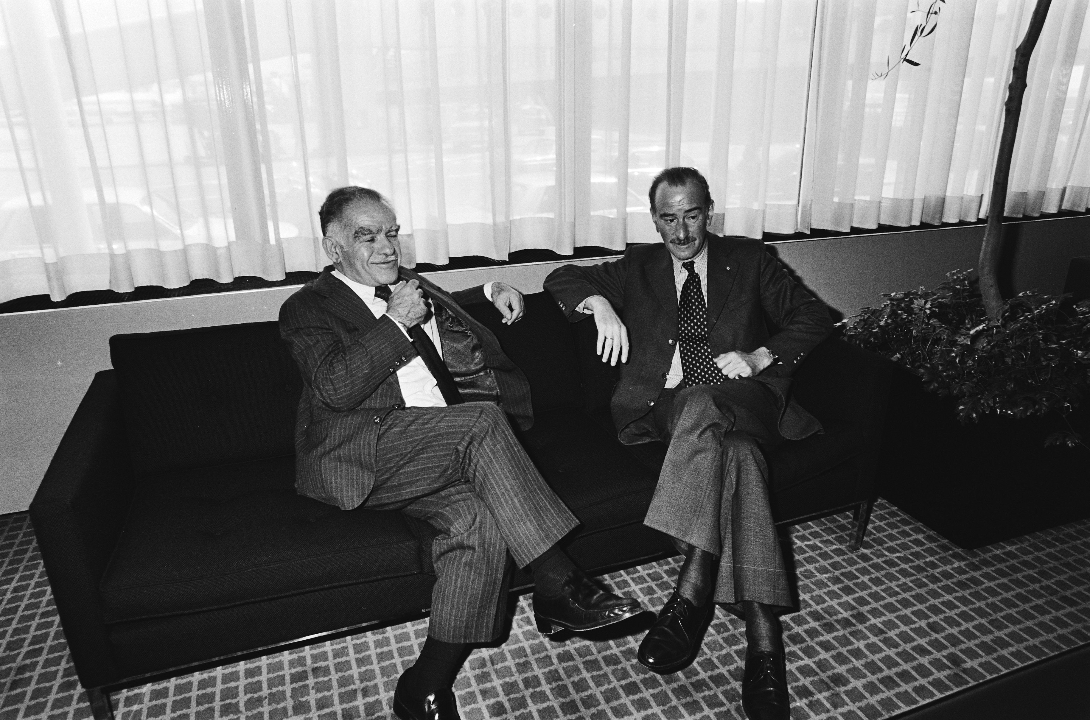 Collectie / Archief : Fotocollectie Anefo Reportage / Serie : [ onbekend ] Beschrijving : Vertrek Israelische minister van Buitenlandse Zaken, Jitschak Sjamir van Schiphol; Jitschak Sjamir (links) en minister v.d. Klaauw Datum : 5 juni 1980 Trefwoorden : ministers Persoonsnaam : Jitschak Sjamir, Klaauw, Chris van der Fotograaf : Antonisse, Marcel / Anefo Auteursrechthebbende : Nationaal Archief Materiaalsoort : Negatief (zwart/wit) Nummer archiefinventaris : bekijk toegang 2.24.01.05 Bestanddeelnummer : 930-8642